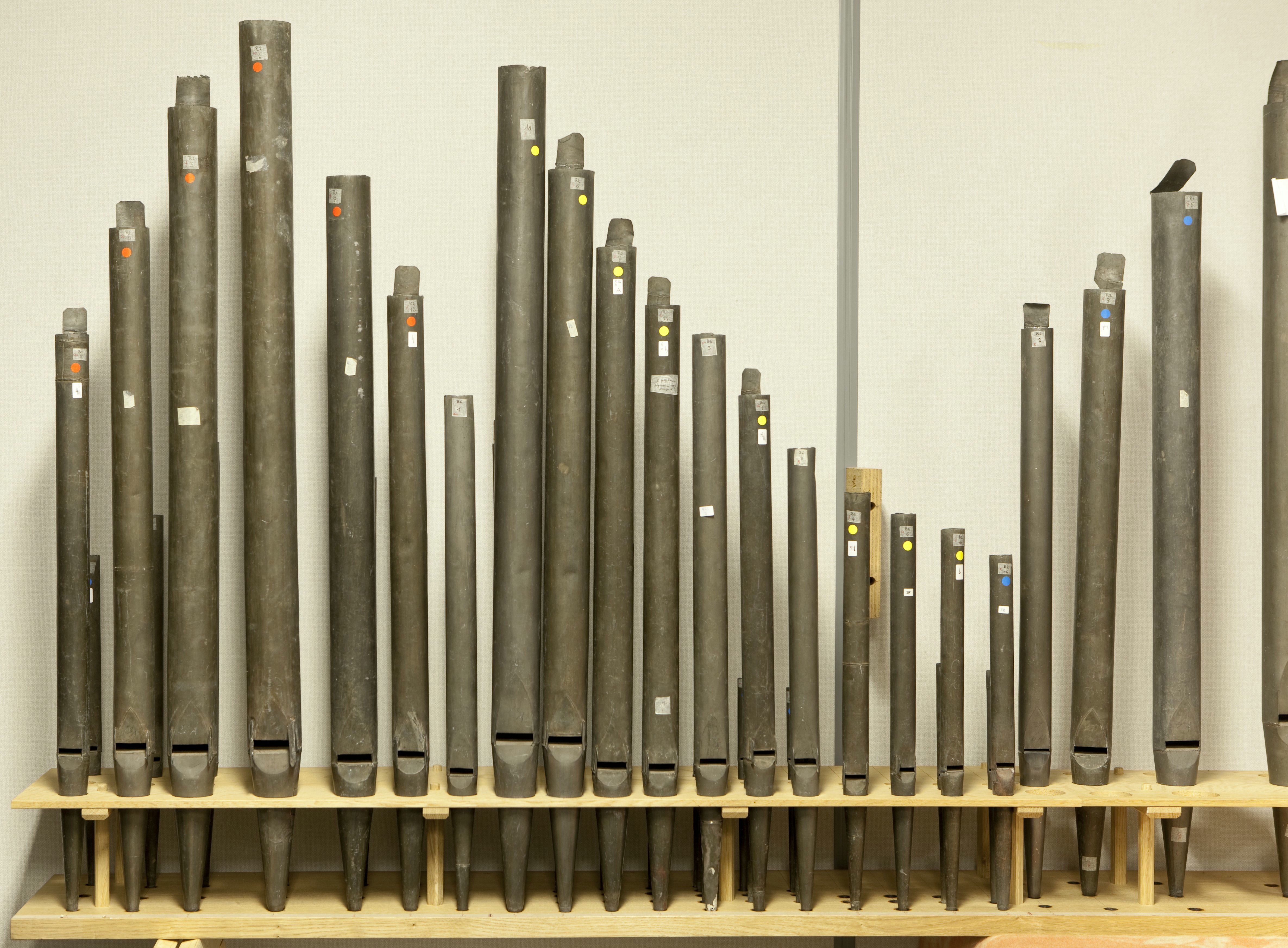 Nicolaï Orgel: Interieur orgelmakerij Reil te Heerde, aantal orgelpijpen